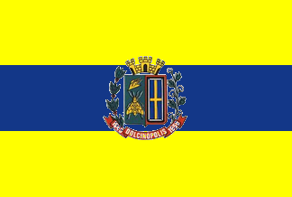 Bandeira de Dolcinópolis - SP - Brasil.